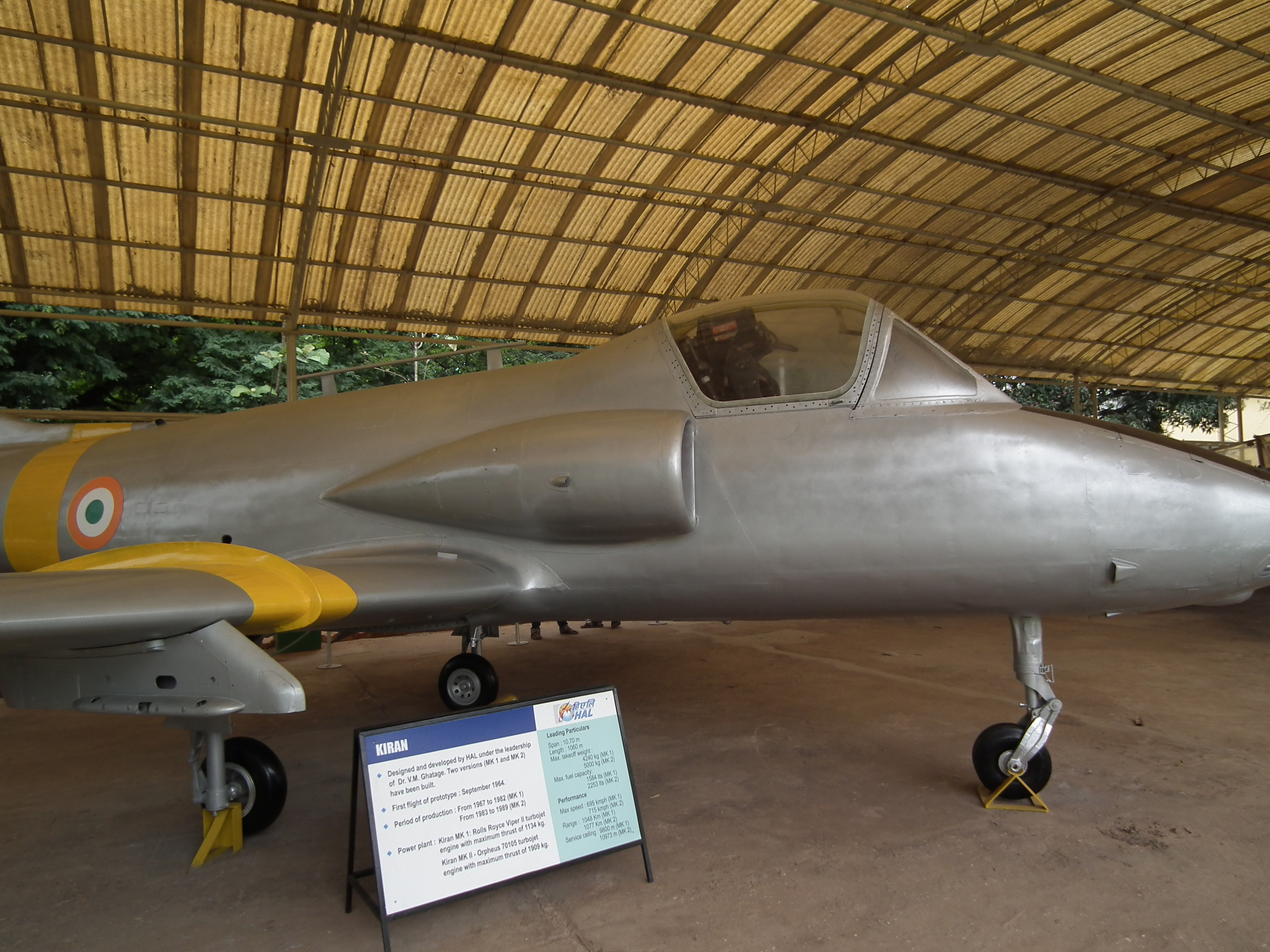 HAL kiran displayed at HAL Museum Bangalore.